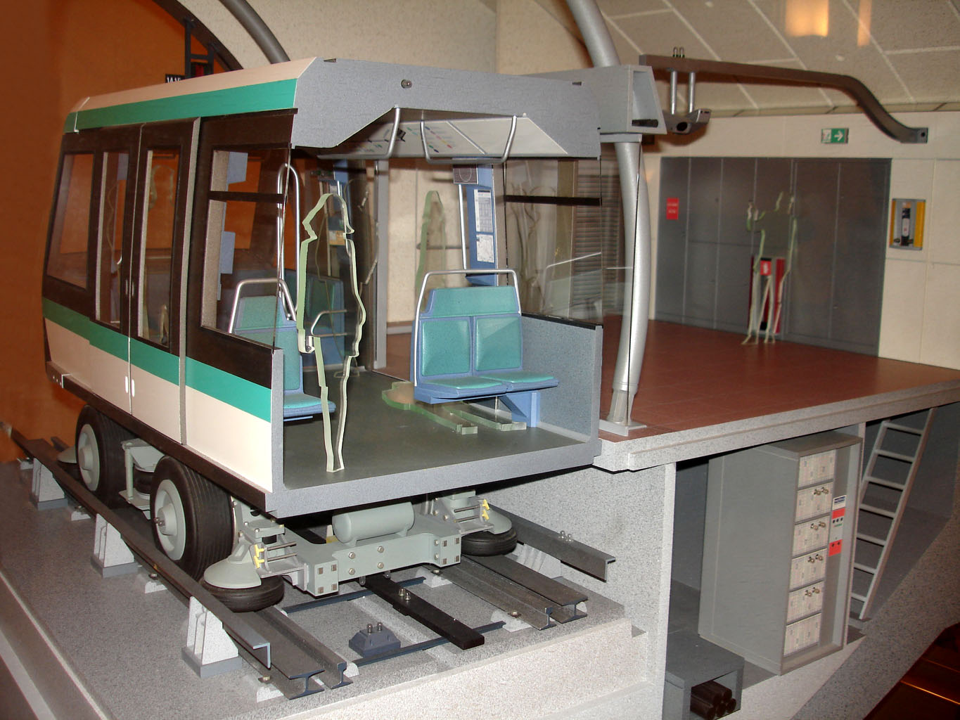 Coupe d'une station de la ligne 14 du métro de Paris, musée des Arts et Métiers, Paris, France.